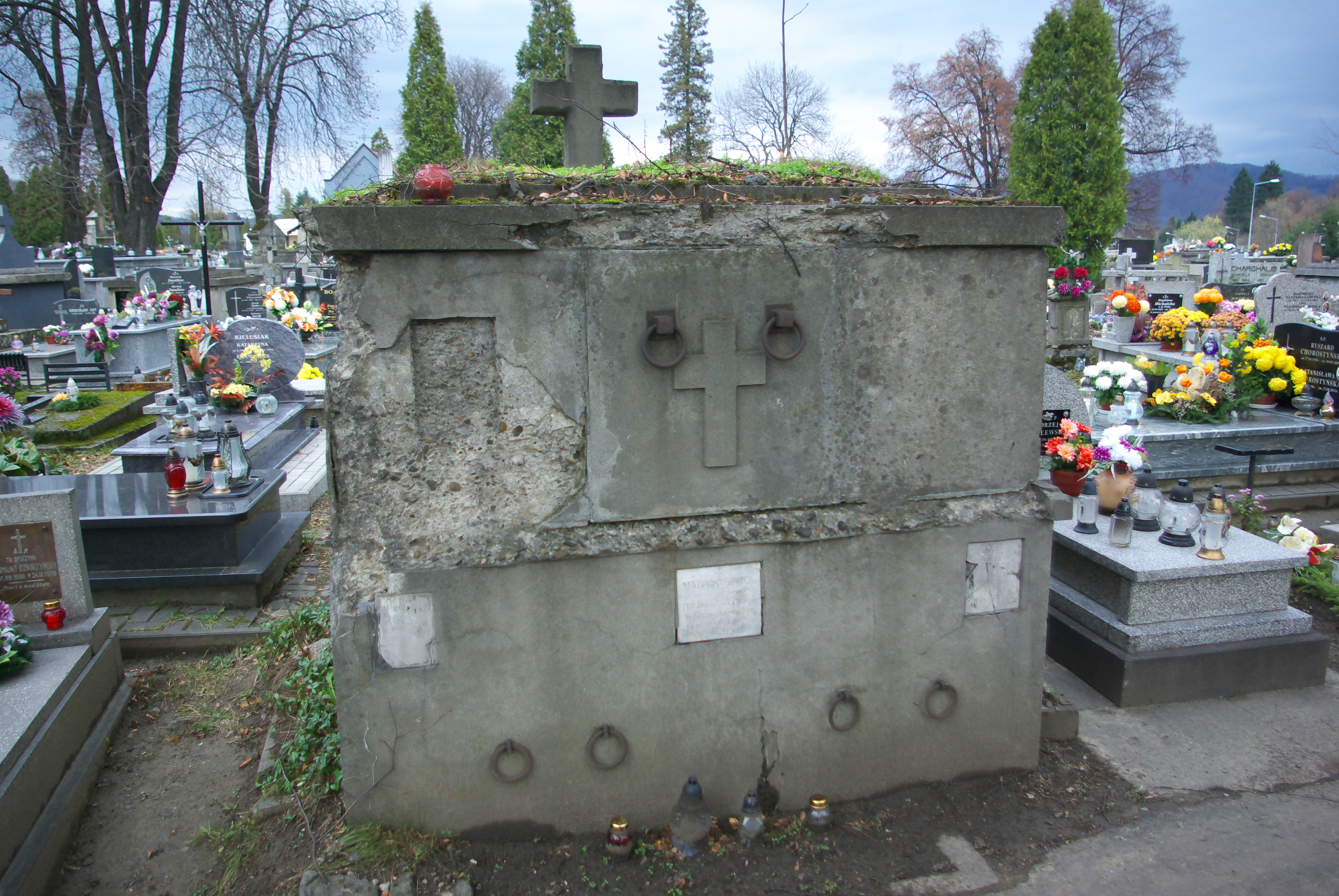 Grobowiec rodzin Machnickich, Staruszkiewiczów i Jana Rucińskiego na Cmentarzu Centralnym w Sanoku.